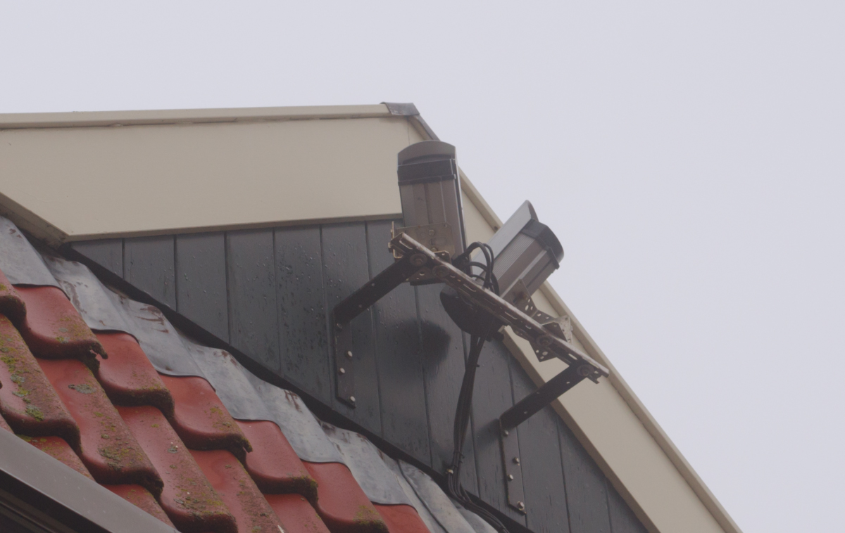 Volautomatische meteoorcamera's van het NASA/SETI CAMS Terschelling project staan opgesteld op het dak van de ontvangstruimte van vakantiepark Tjermelân